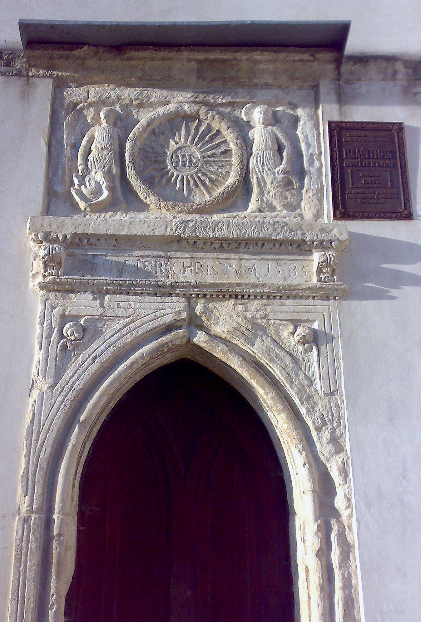 Renaissance portal of St.Stanislav Church in Dunayiv, Lviv Region, Ukraine/Ренесансний портал церкви Св. Станіслава у селі Дунаїв, Перемишлянський район, Львівська область, Україна/ Ренессансный портал церкви Св. Станислава, Дунаев, Перемышлянский район, Львовская область, Украина